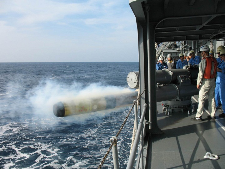 12式魚雷は、浅海域から深海域までのあらゆる海域を行動する高性能潜水艦を攻撃できる魚雷です。